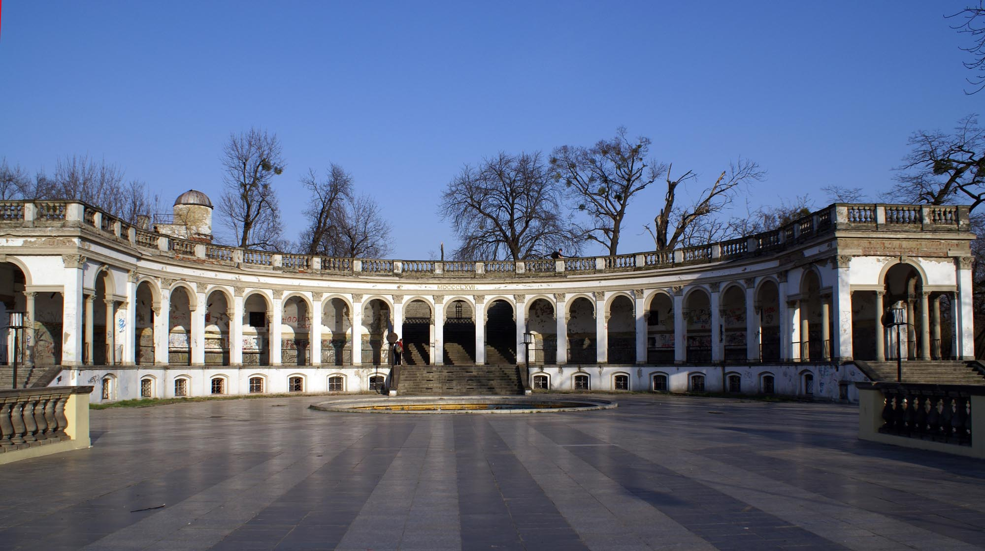 Liebichshöhe, Breslau, Niederschlesien, Polen.